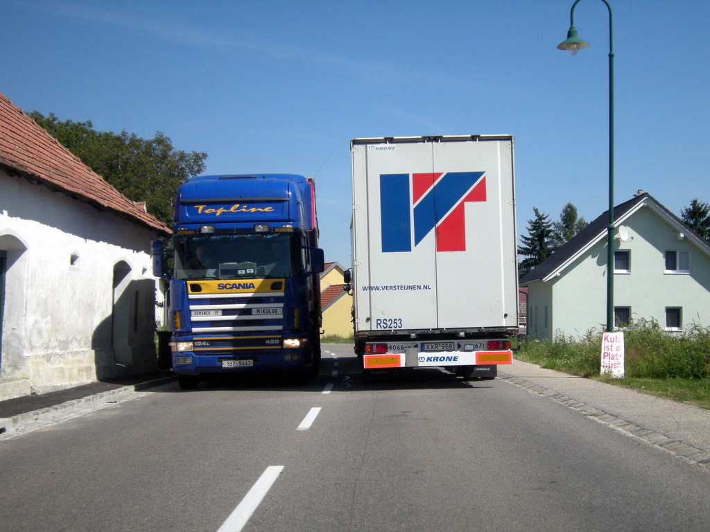 Transit LKW auf der Laaer Straße in Harmansdorf